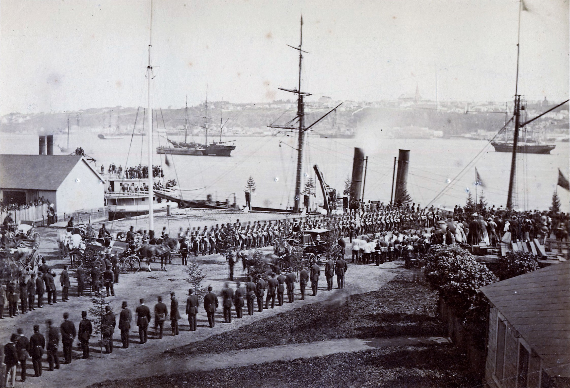 Port de Québec – Départ des troupes de l'armée britannique le 11 novembre 1871 « Le 11 novembre 1871, après une présence de plus de cent douze ans, la garnison britannique quitte la ville. Les officiers et les soldats du 60e régiment, du Royal Artillery et des Royal Engineers sortent de la Citadelle de Québec et du parc de l'Artillerie et défilent pour la dernière fois dans les rues de Québec. Au quai Saint-André, en présence d’une grande foule, ils embarquent sur le navire-transporteur de troupes Orontes. » – BAnQ